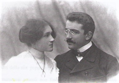 Paolo Arcari con la moglie Maria Pievani il giorno delle nozze